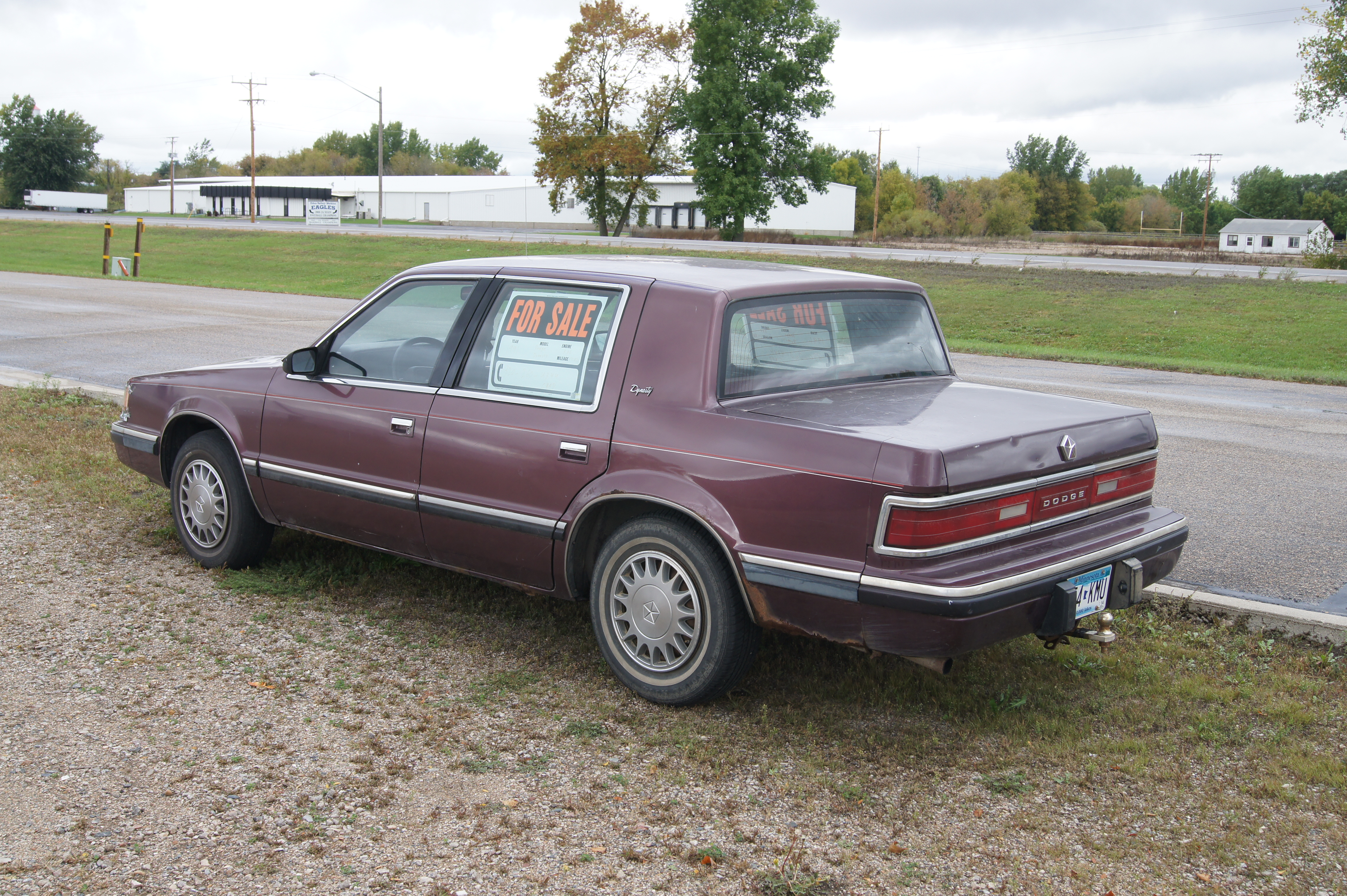 91 Dodge Dynasty